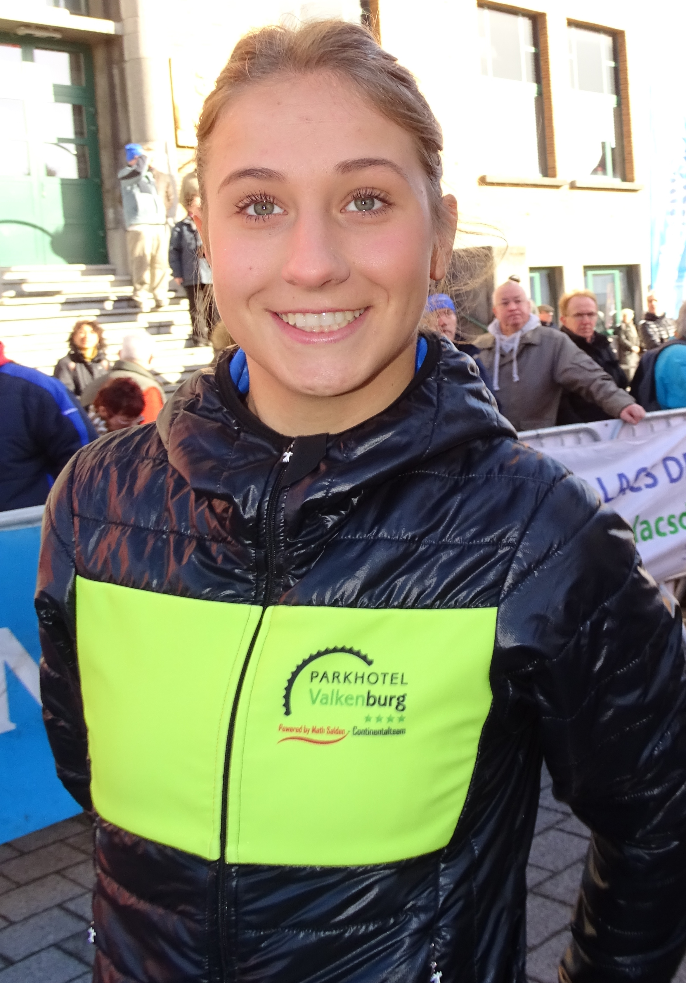 Reportage réalisé le mercredi 2 mars à l'occasion du départ du Samyn des Dames 2016 et du Samyn 2016 à Quaregnon, Belgique.